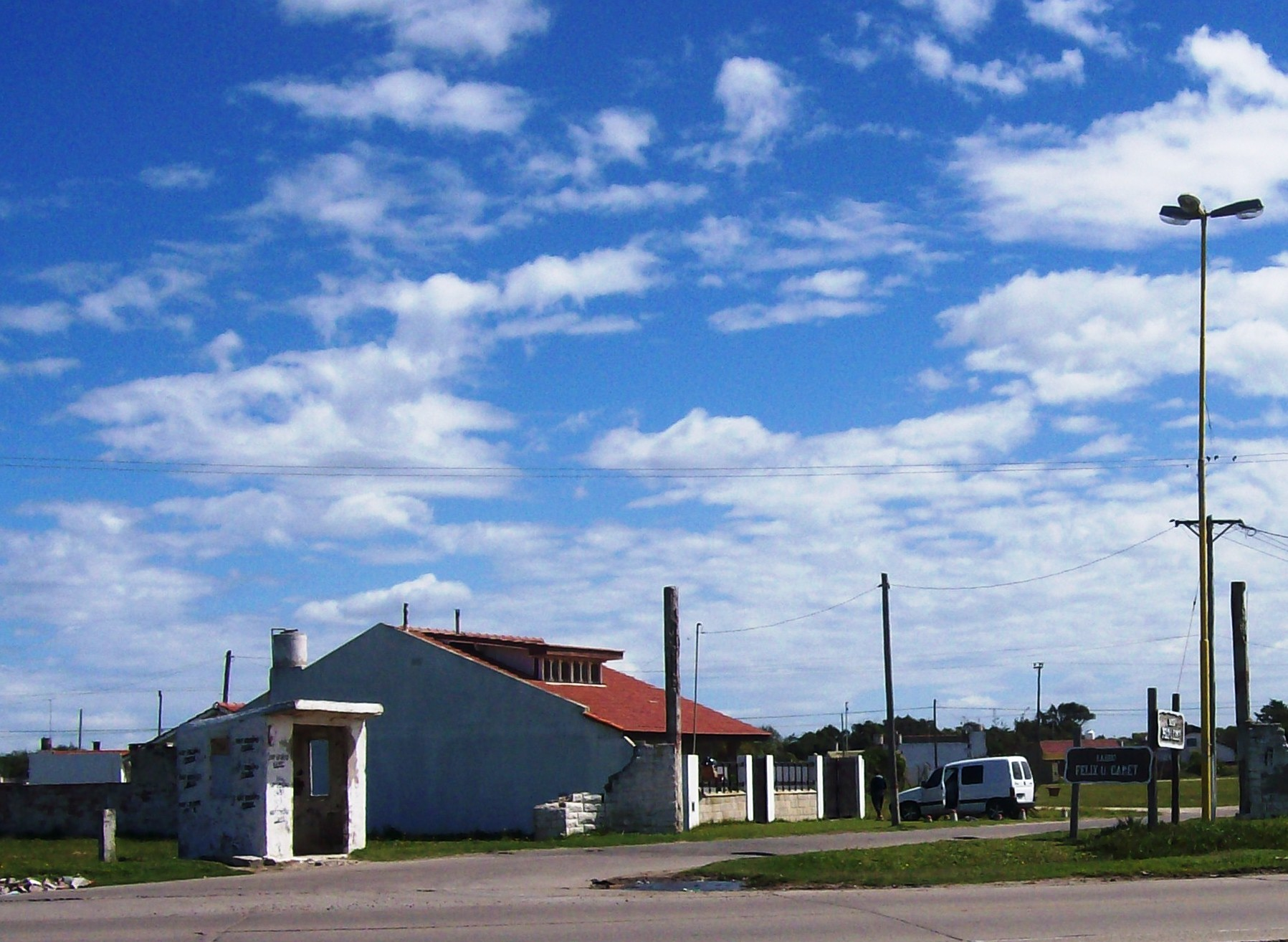 Entrada